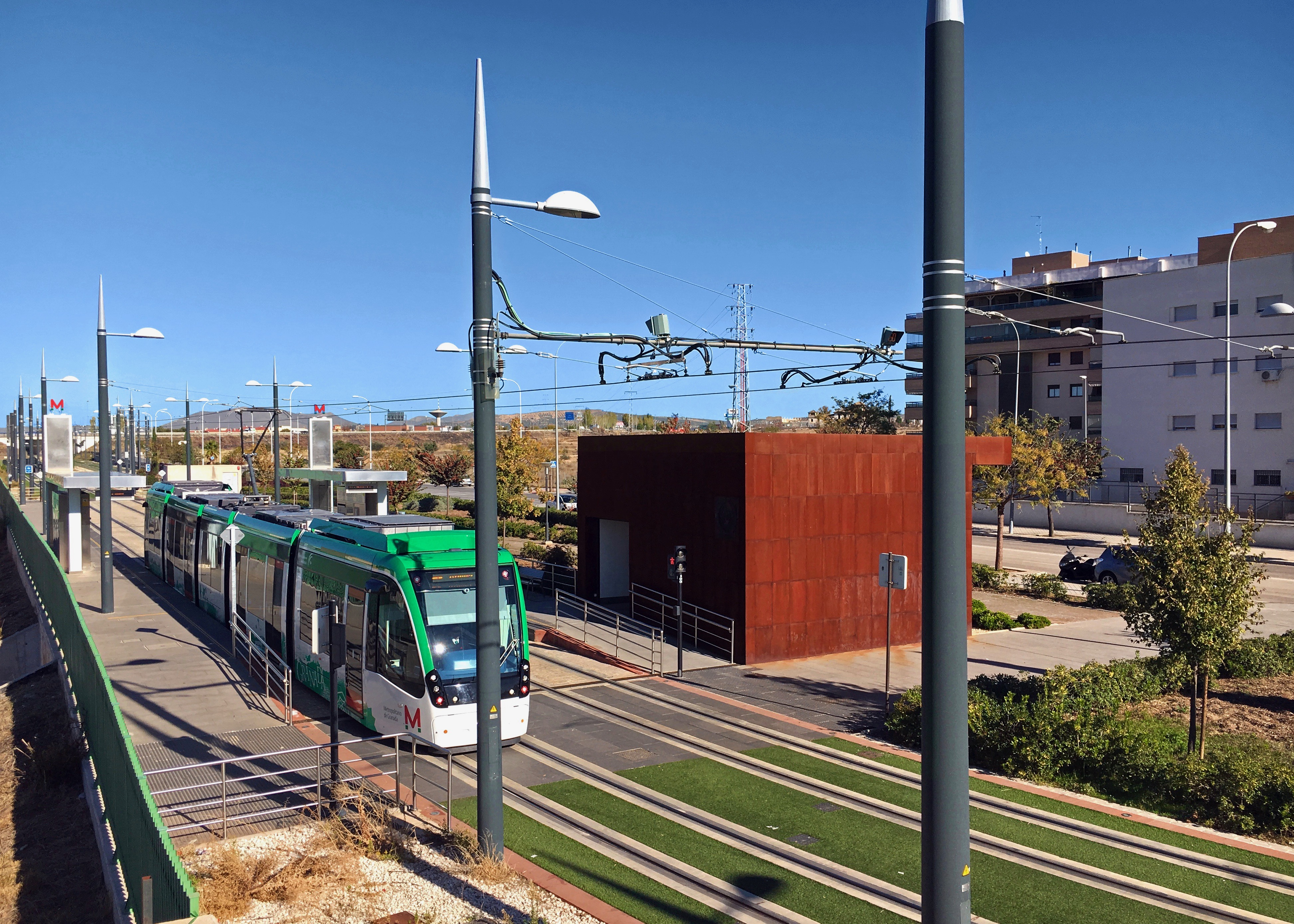 Estación de Cerrillo de Maracena del Metro de Granada